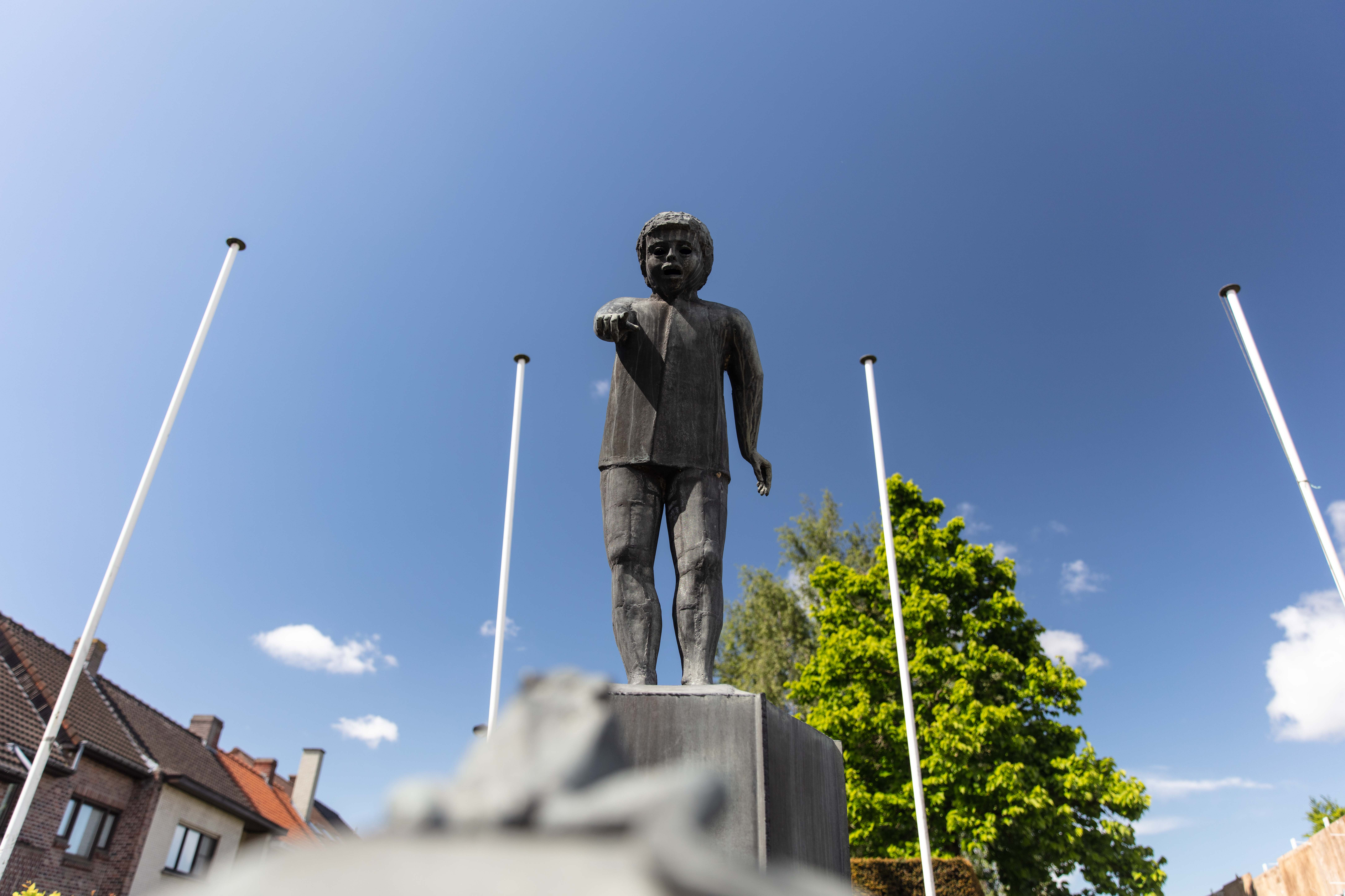 Het Gaperke is een bronzen beeld van een jongetje dat met open mond naar een kikker staart, gemaakt door Jef Claerhout. Het beeld staat op een plantsoen langs de Kerkstraat in Anzegem. Het beeld verwijst naar de spotnaam die de Anzegemnaren gaven: de Gapers.